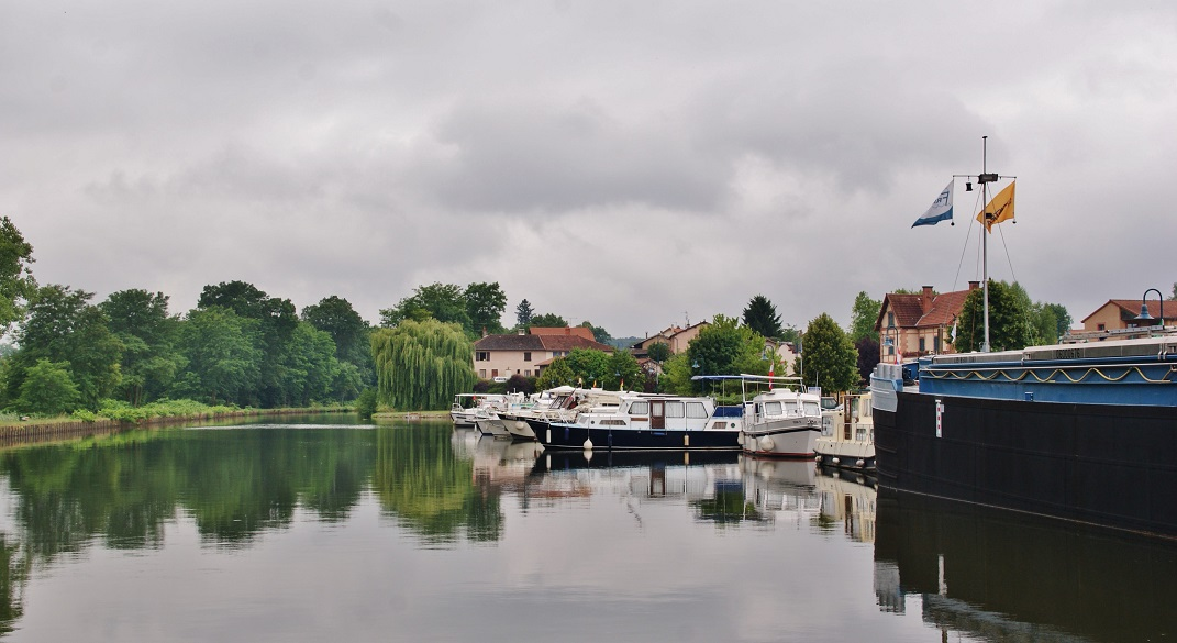 Le Canal